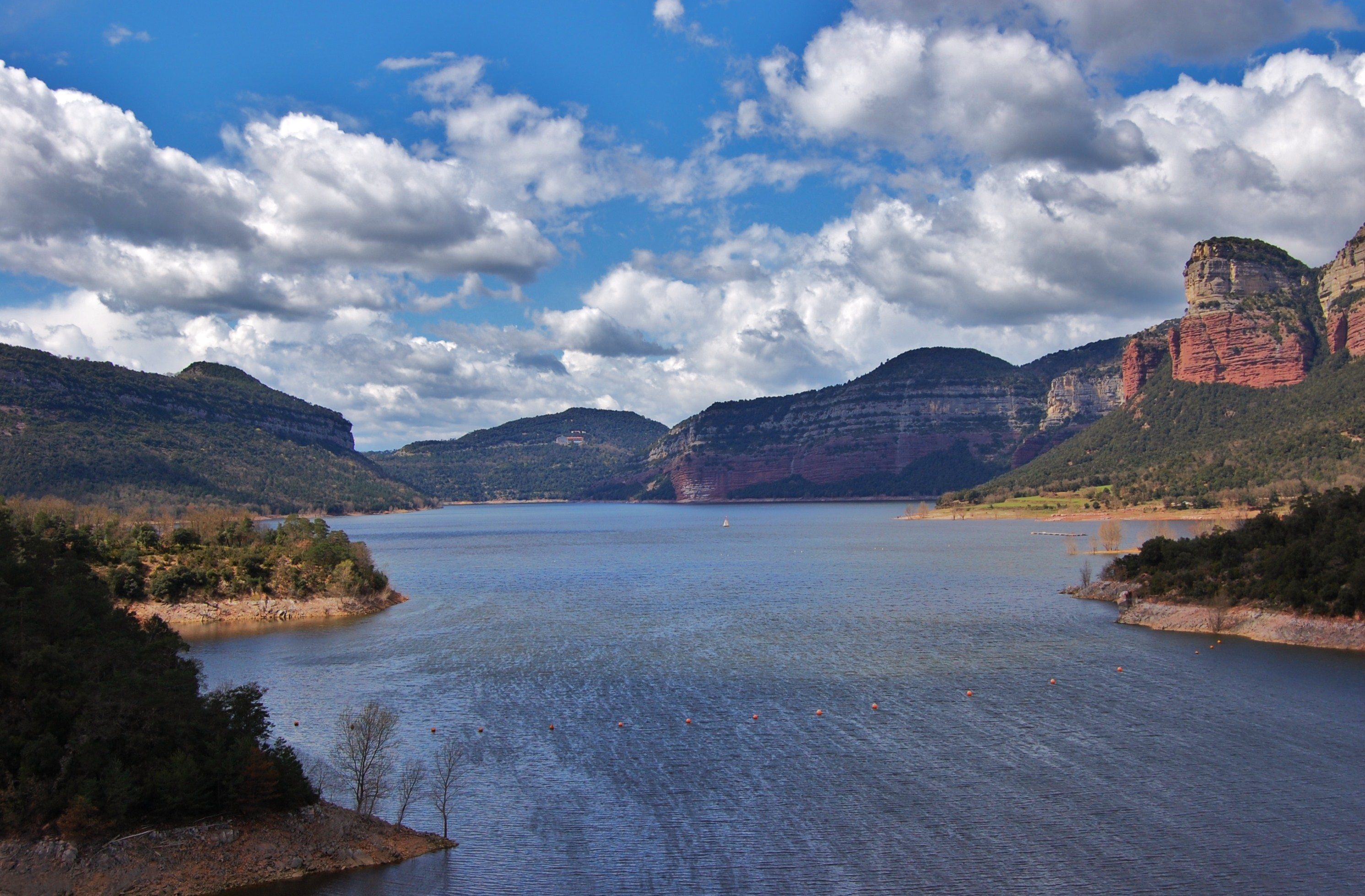 Pantà de Sau (Vilanova de Sau) This is a a photo of a natural area in Catalonia, Spain, with id: ES510099